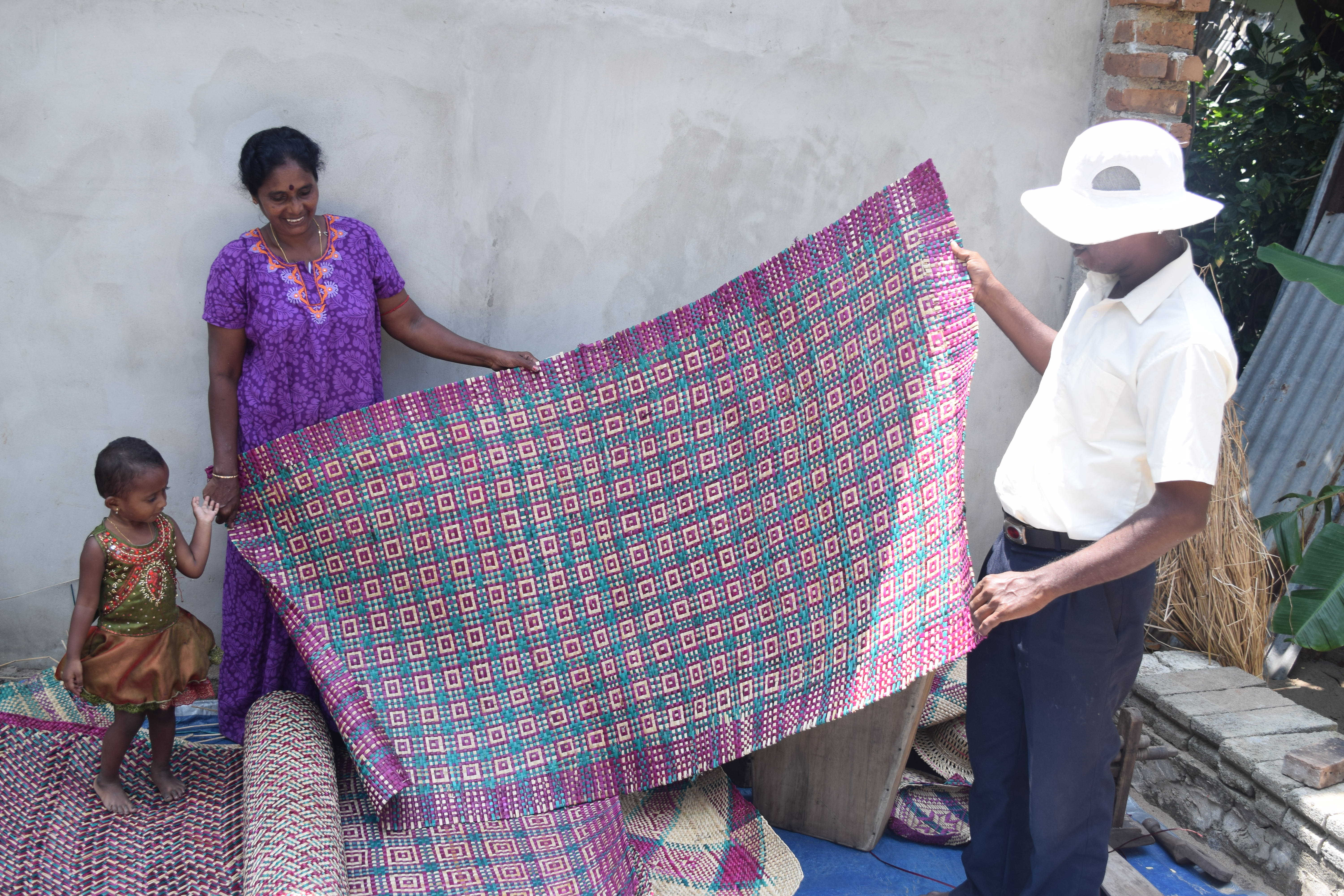 பன்புல் கைத்தொழில் தொடர்பாக குருக்கள்மடம், மட்டக்களப்பு, இலங்கையில் நடைபெற்ற கள ஆவணப்படுத்தலின் போது மார்சு 2018 இல் எடுக்கப்பட்ட ஒளிப்படம்.